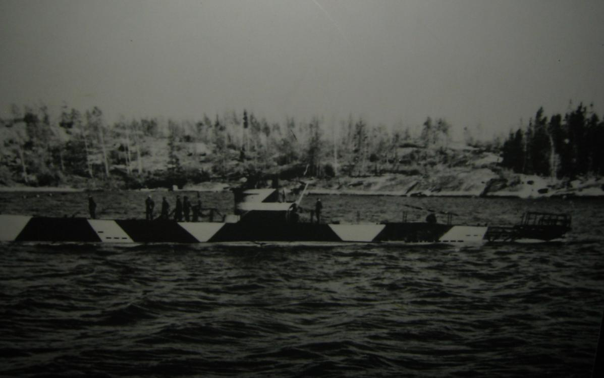 Submarine Vesikko